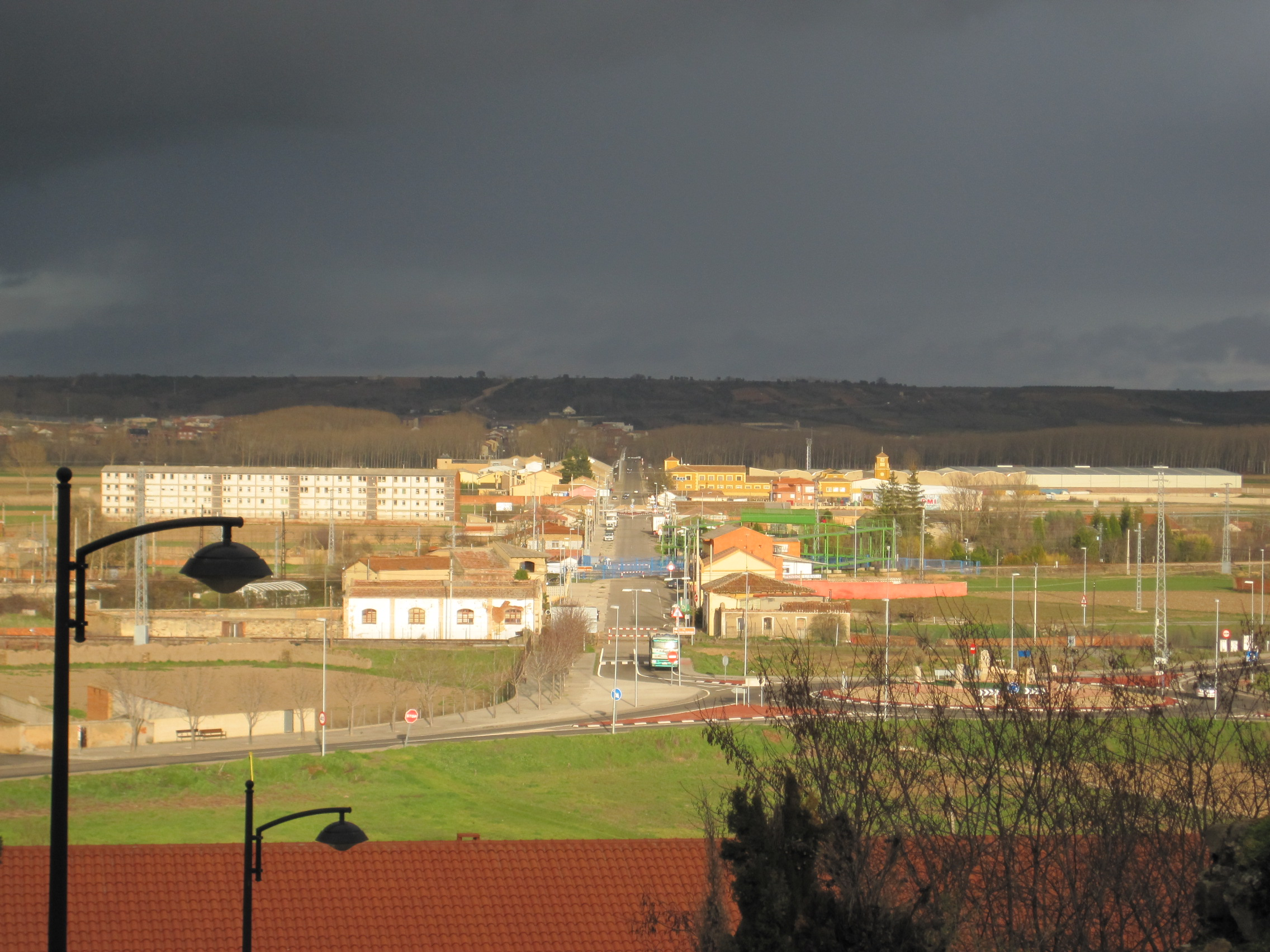 Vista desde Astorga de la carretera nacional 120 en dirección a León (España).